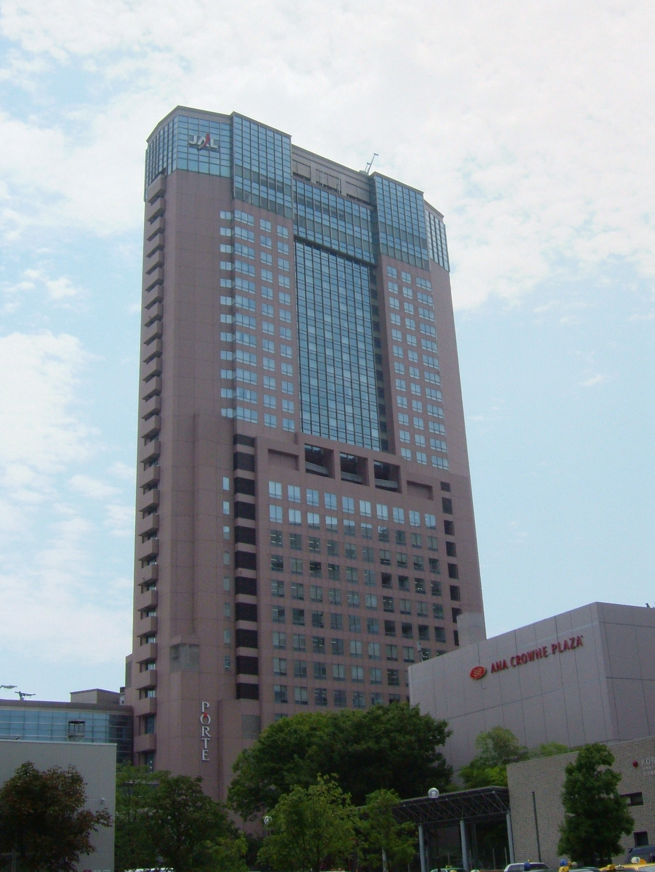 石川県金沢市にあるポルテ金沢。石川県では最高層のビル。また、JALホテルズに属するホテル日航金沢も入居している。